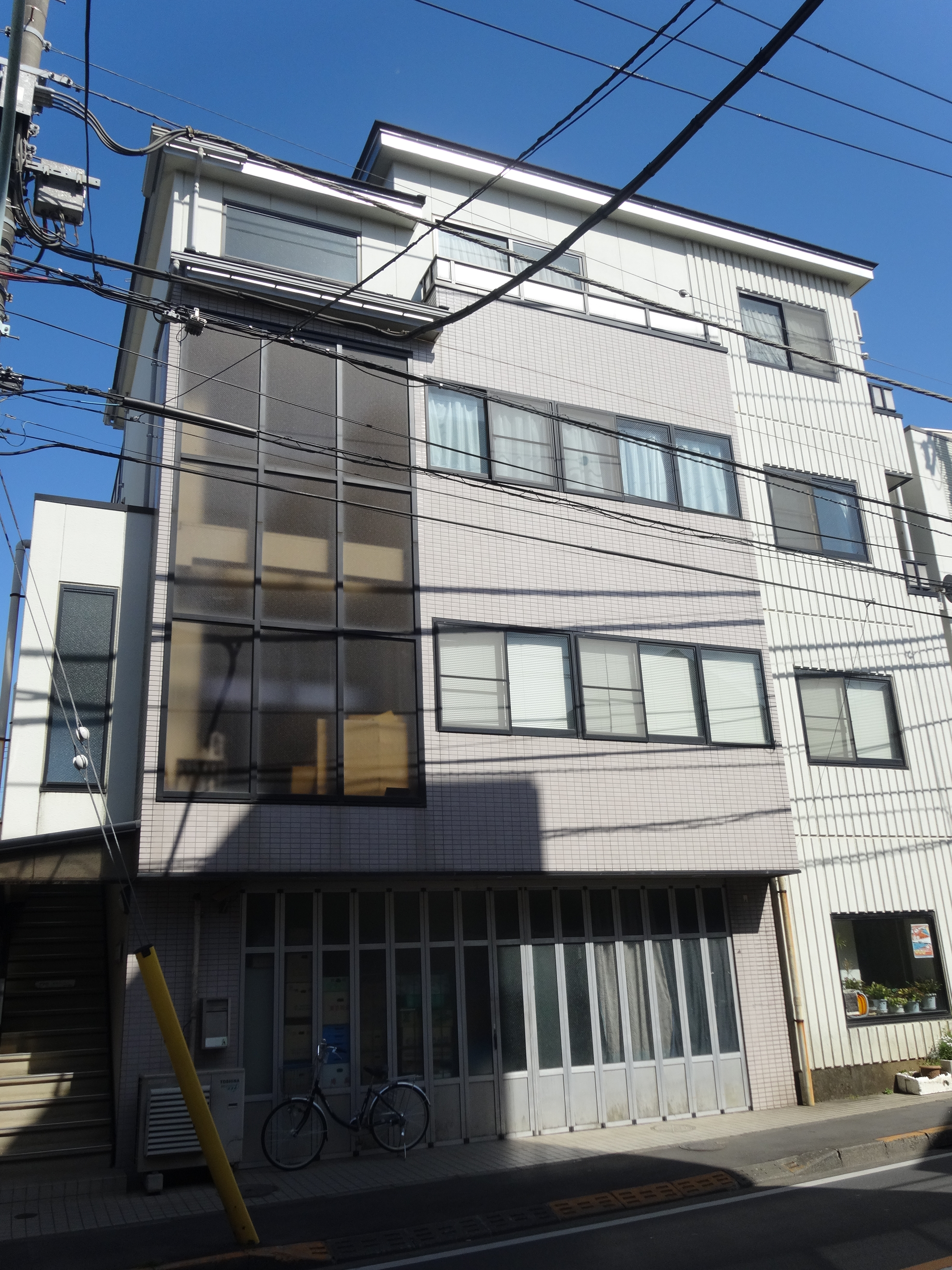 東京都清瀬市に所在する横山ビル。アニメ制作会社・TYOアニメーションズ（2・3F）などが入居している。